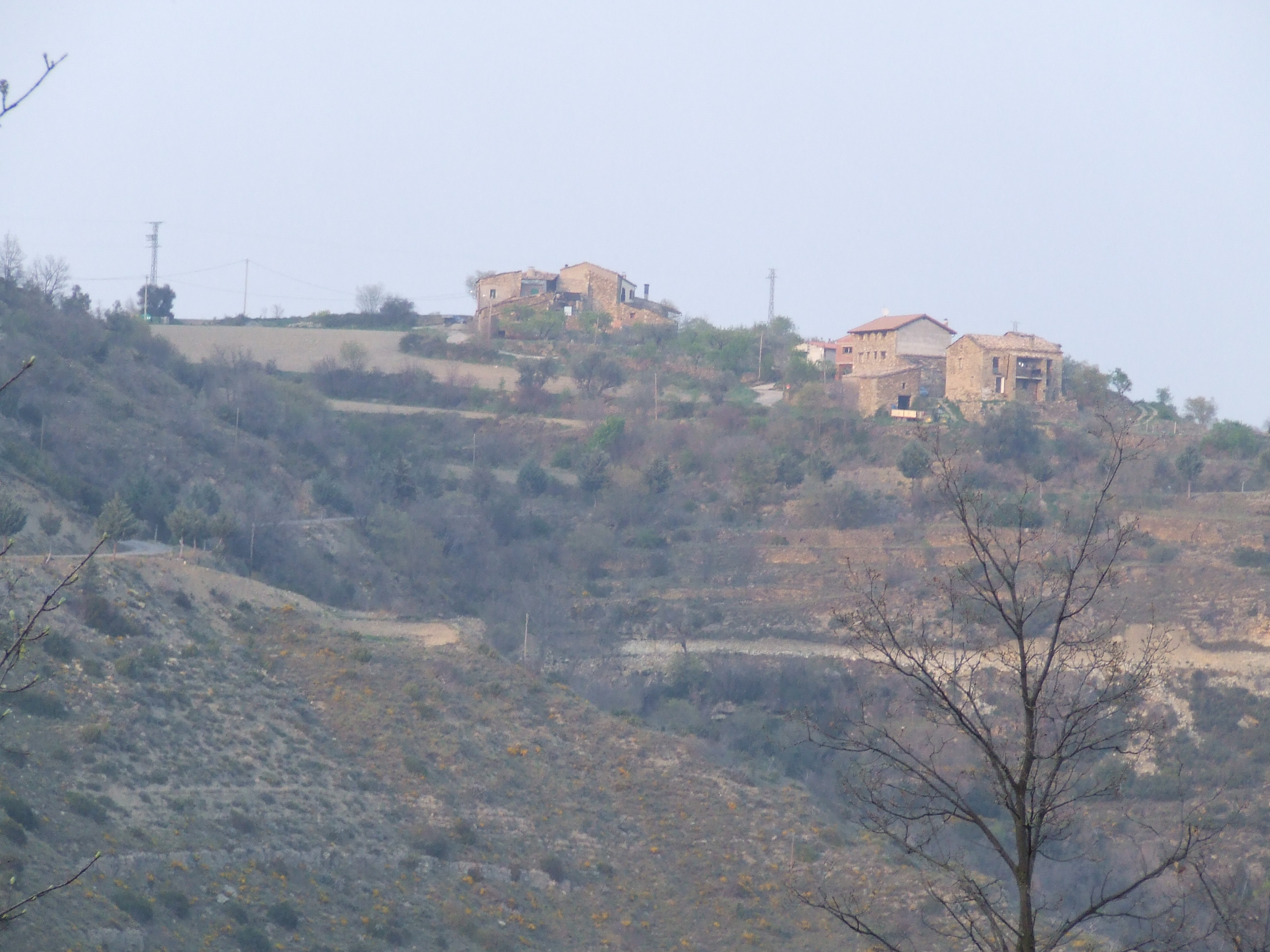 El poble de Collmorter (Mur, Castell de Mur, Pallars Jussà)